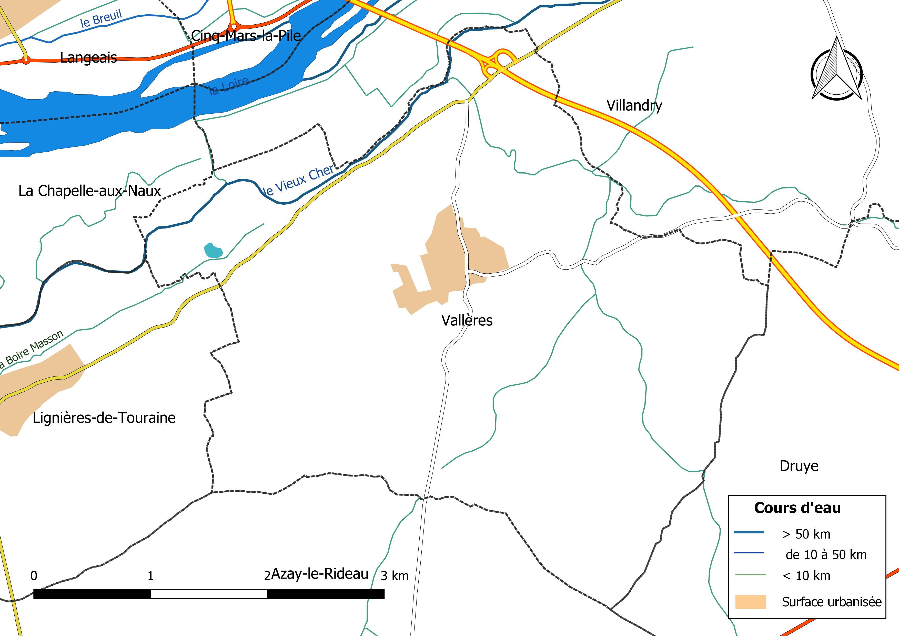 Carte du réseau hydrographique de la commune de Vallères (France).